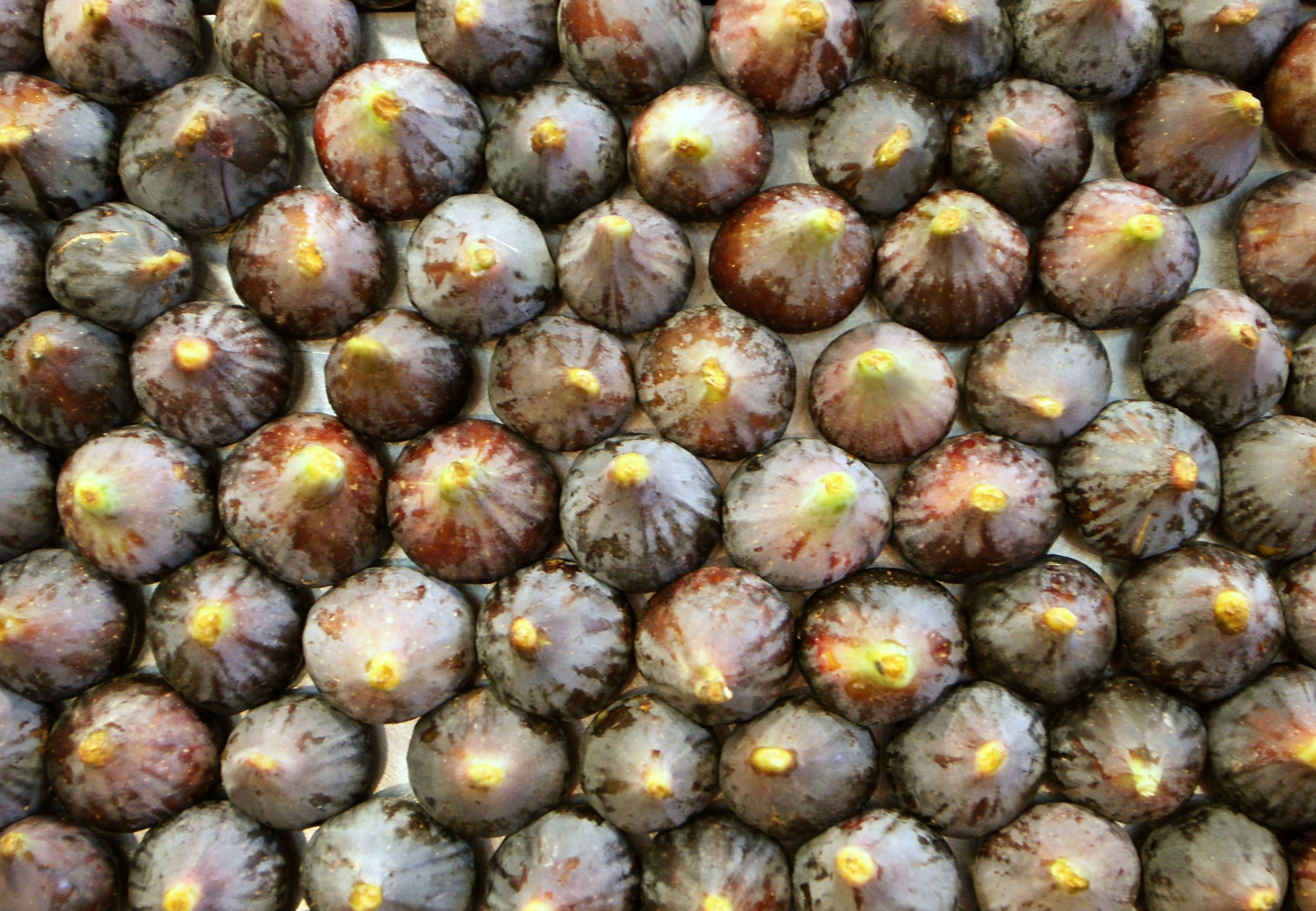 Die Markthallen des Mercat de la Boqueria liegen an der Straße La Rambla in Barcelona, Spanien und haben eine Fläche von 2.583 m².